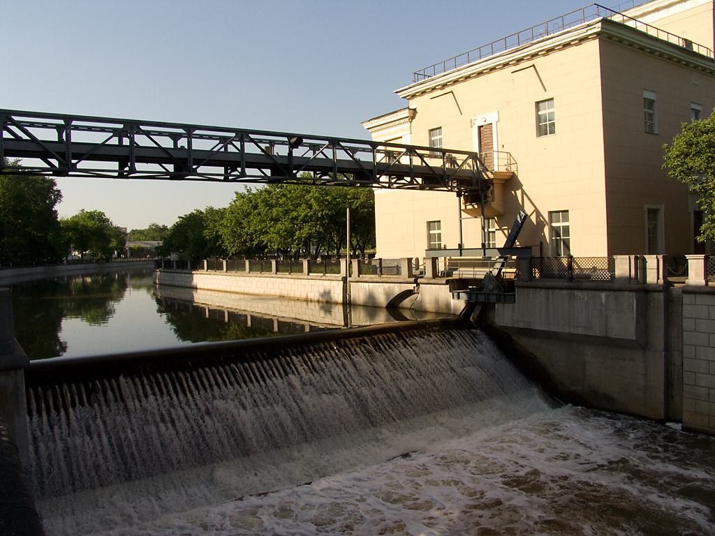 Yauza River in Moscow